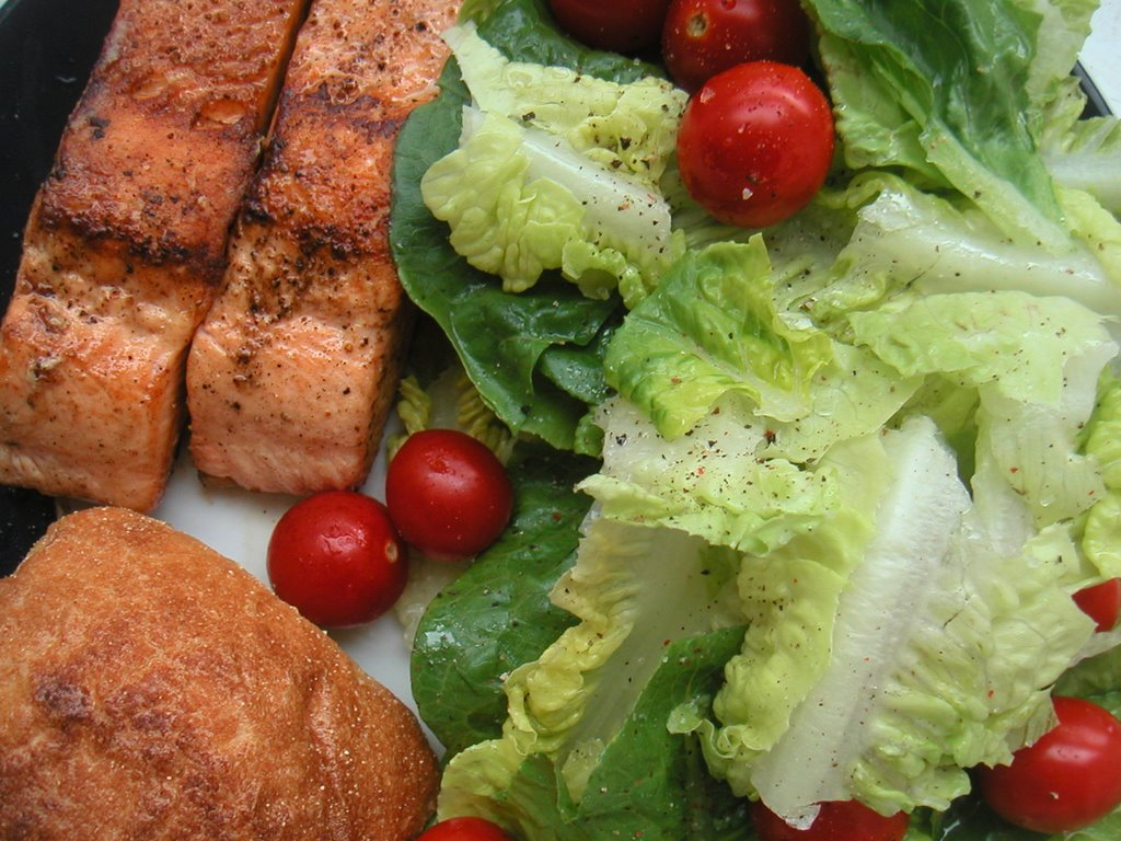 Laks med salat og brød